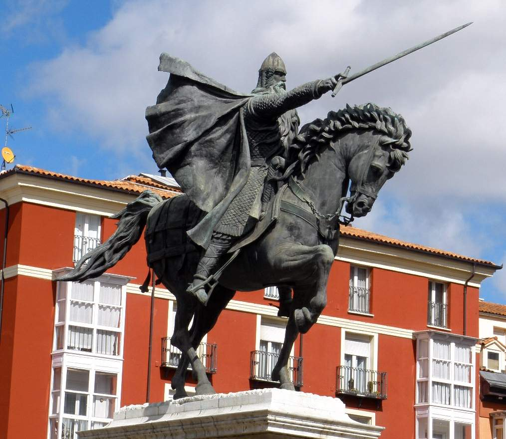 Estatua del Cid (Burgos)